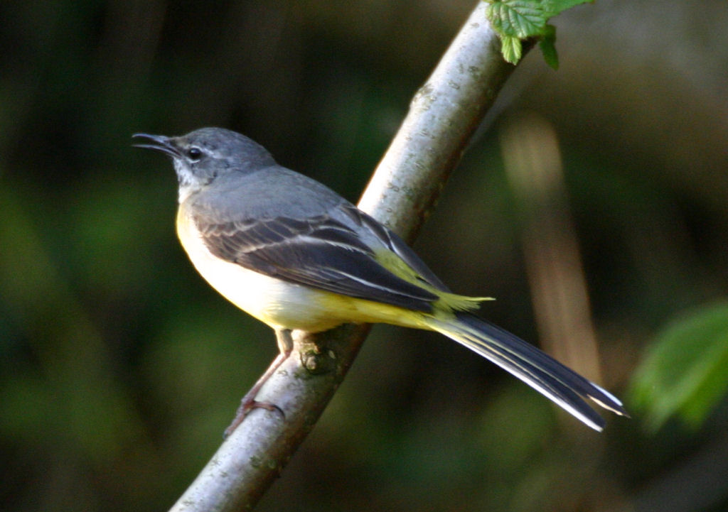 Grey Wagtail. Taken at Lydbrook, England